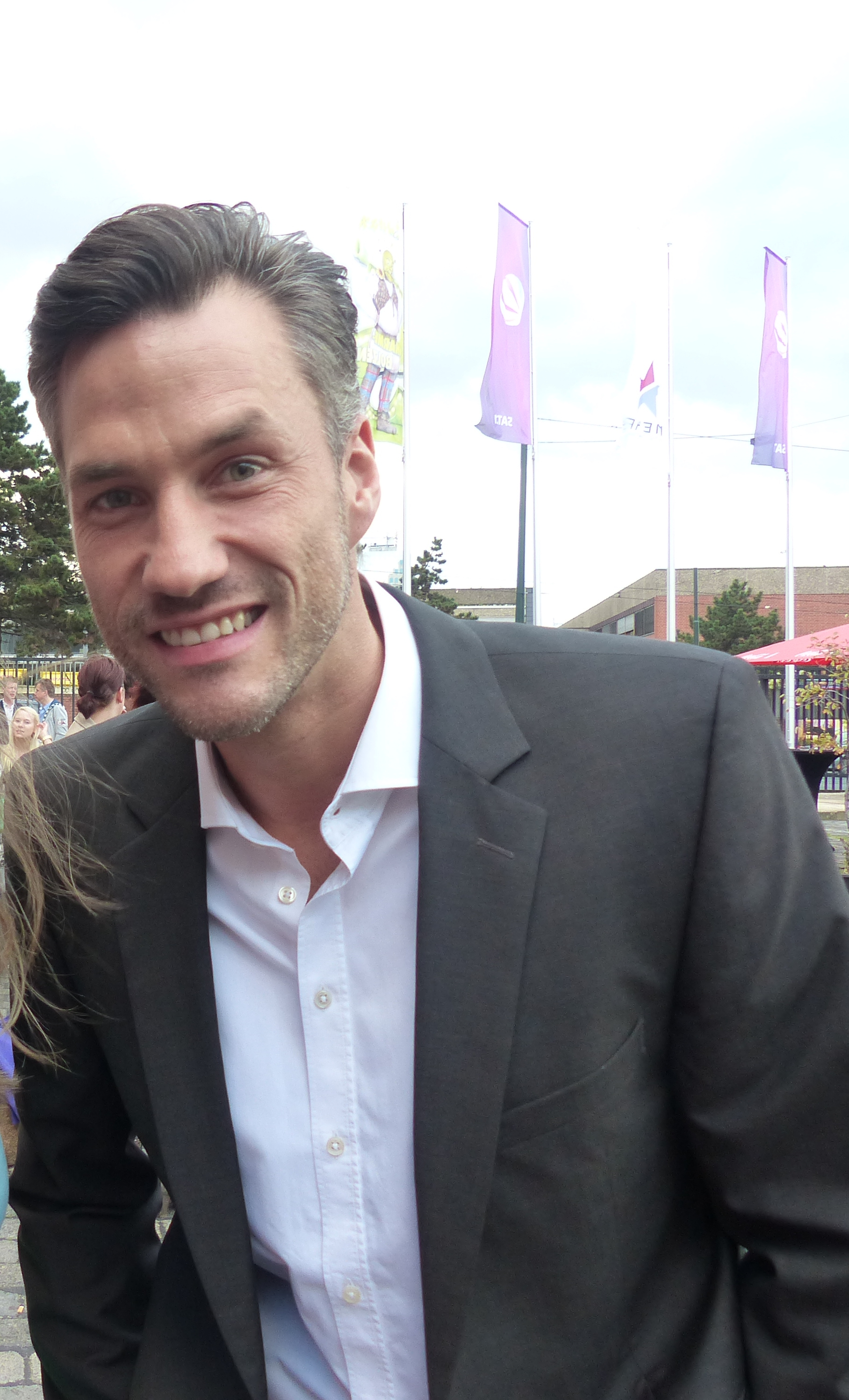 Stefan Bockelmann bei der Shrek - Das Musical Premiere, 19.10.'14, Düsseldorf